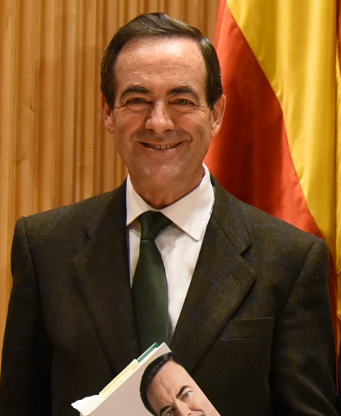 Fotografía del expresidente del Congreso de los Diputados (PSOE) y expresidente de Castilla-La Mancha, José Bono Martínez, en la presentación de su libro, en noviembre de 2019.